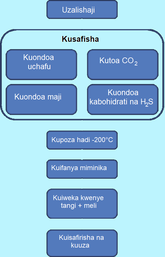 Kiswahili: Mchakato jinsi gani gesi asilia kuwa gesi miminika na kupelekwa kwa wateja